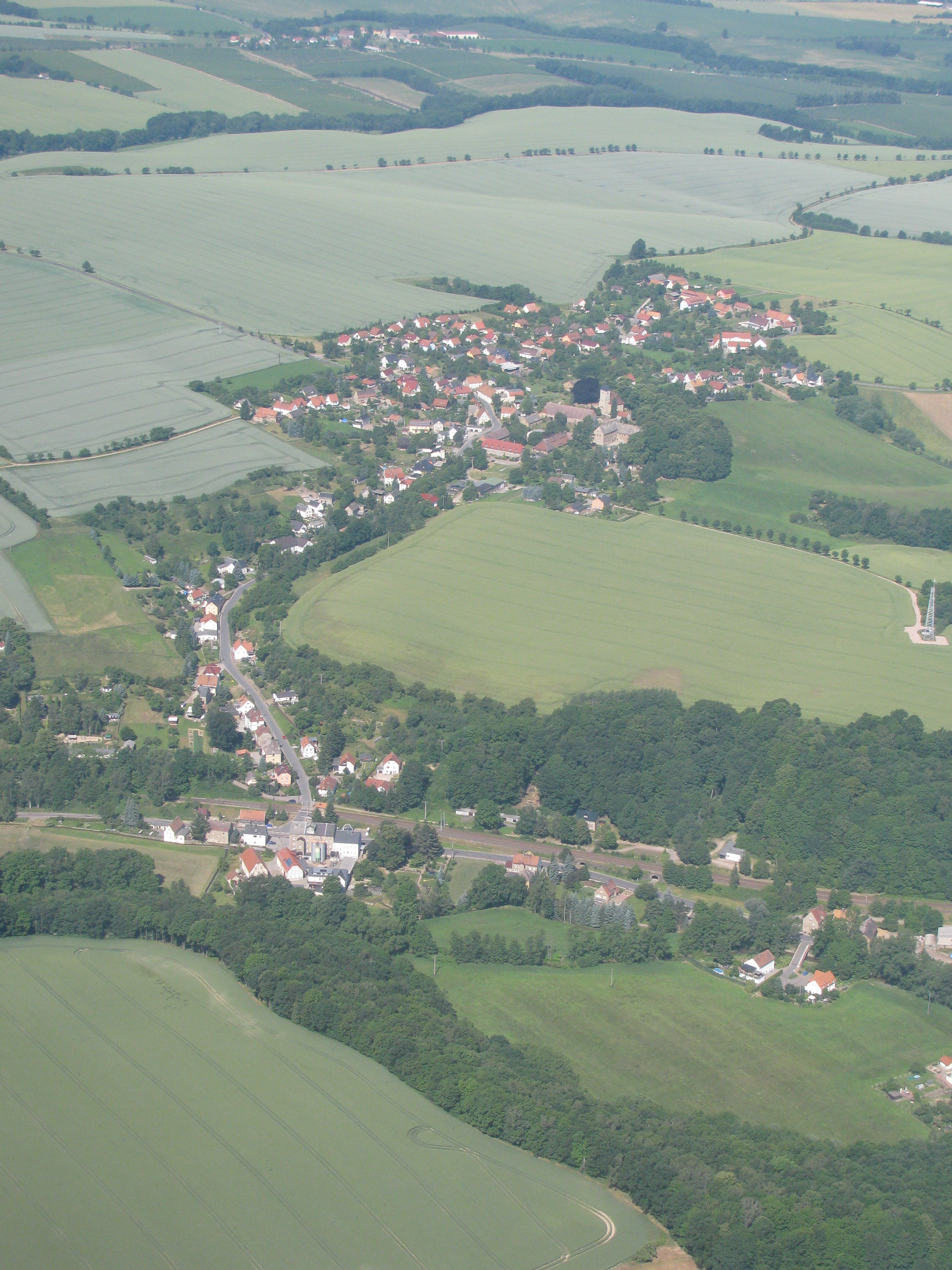 Luftbild Miltitz